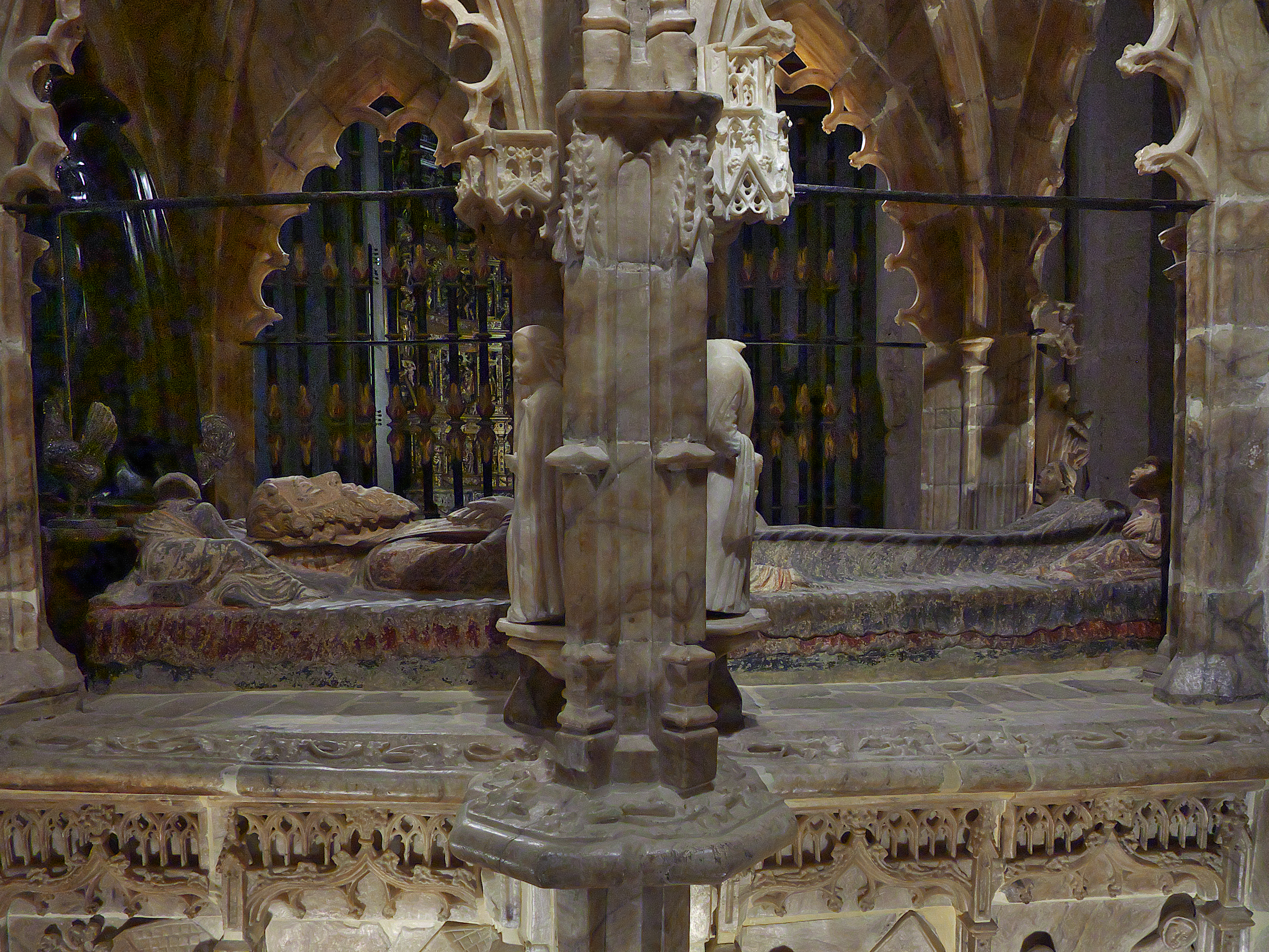 Catedral de Santo Domingo de la Calzada. Lauda de Domingo de la Calzada (s. XIII)